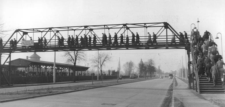 RAW Schöneweide, Feierabend Zentralbild Hesse Bö-Noa 2.3.1957 Eine halbe Stunde früher als sonst! Ein alltäglicher Weg - den die Werkangehörigen des Reichsbahnausbesserungswerkes Schöneweide gehen - und doch war es ein besonderer Weg am 1. März 1957. Eine halbe Stunde früher als sonst war Feierabend. UBz: Die Mitarbeiter des RAW auf dem Nachhauseweg über die Holzbrücke Adlergestell zum Betriebsbahnhof Schöneweide.